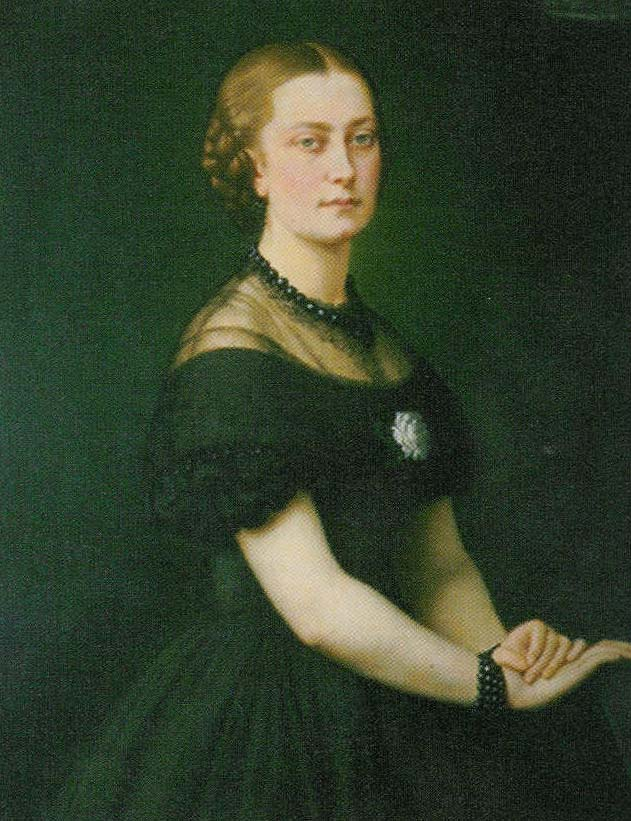 Alice de Kerchove - Bellem - België - zij is één van de betovergrootmoeders van prinses Mathilde van België